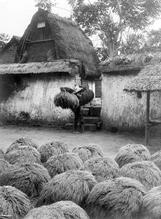 Repronegatief. Padi schuur, Bali